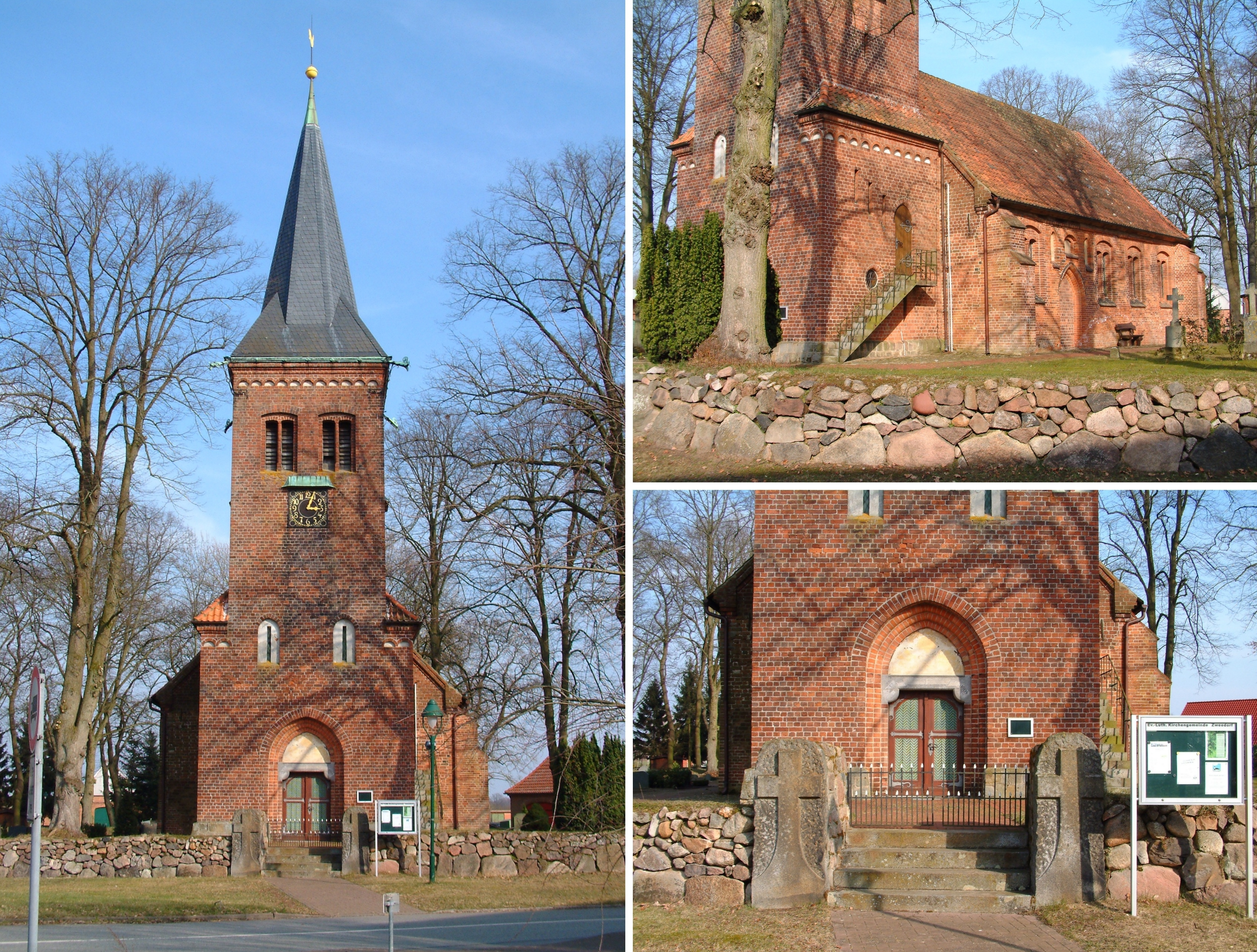 Nosdorf, Dorfkirche